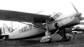 CANT Z.1010 Balilla